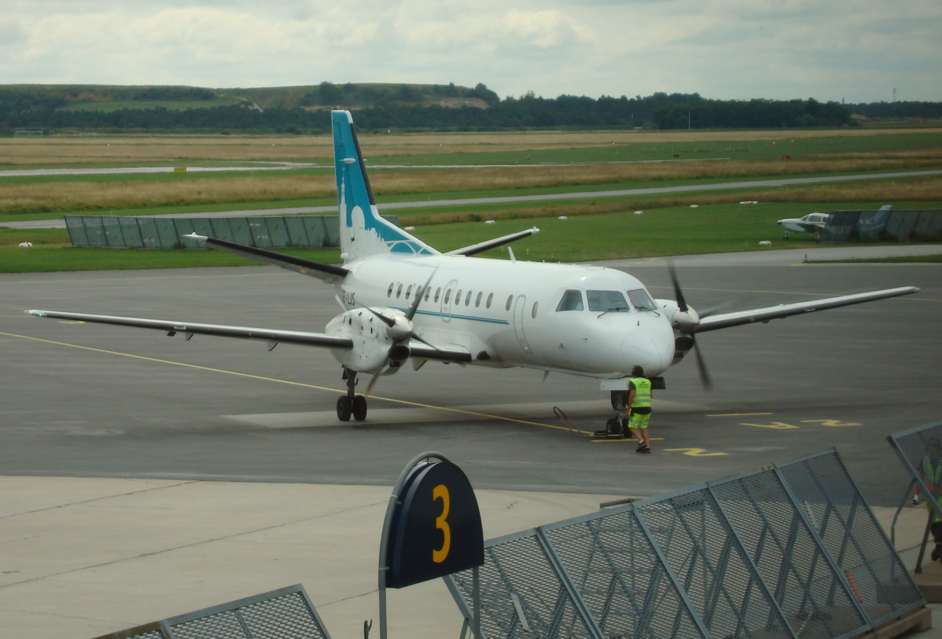 En Saab 340 från Gotlandsflyg på Visby Airport. (Bilden beskuren)